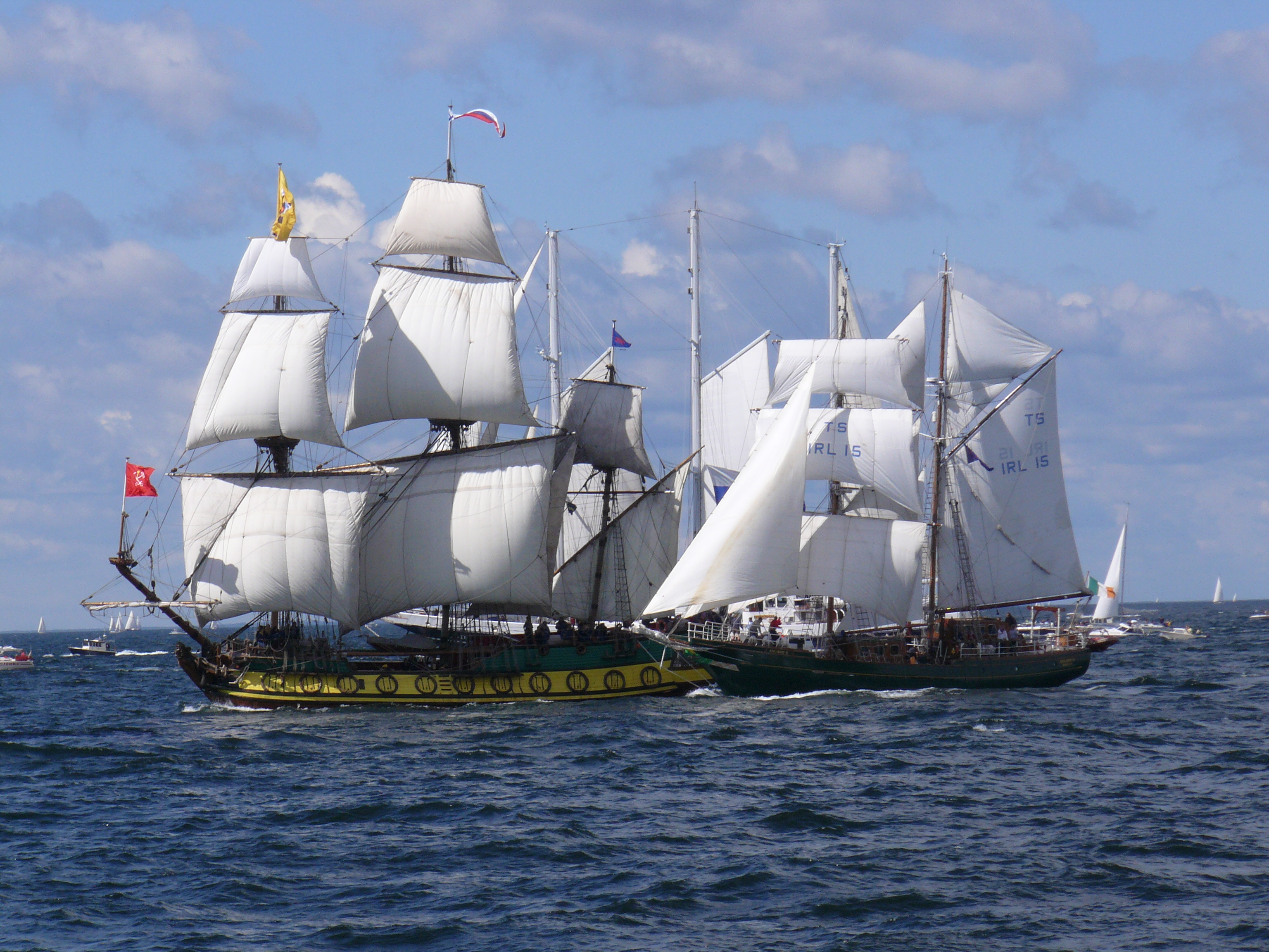 Shtandart